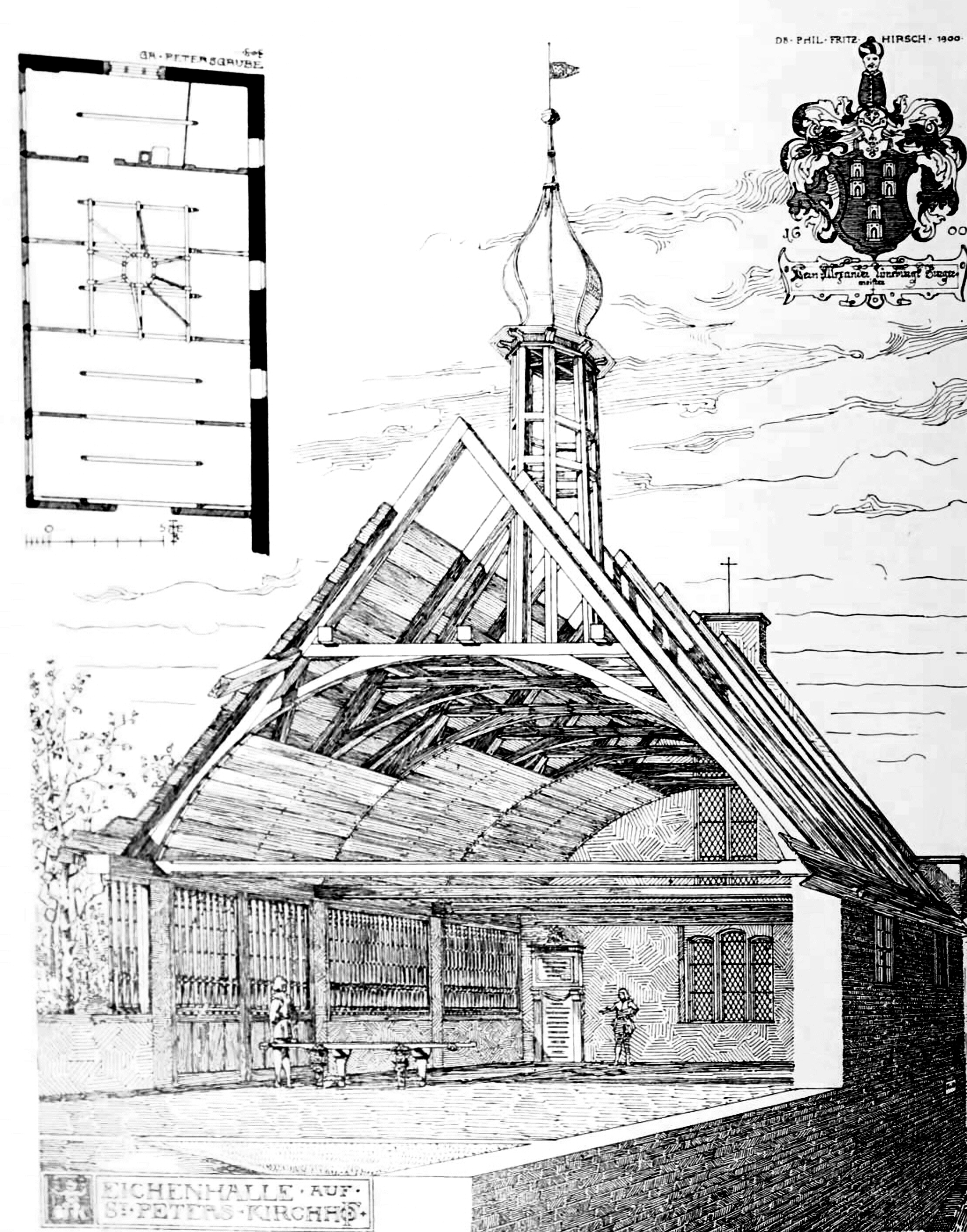 Die Leichenhalle der Petrikirche in Lübeck (erbaut 1600; zerstört 1942)